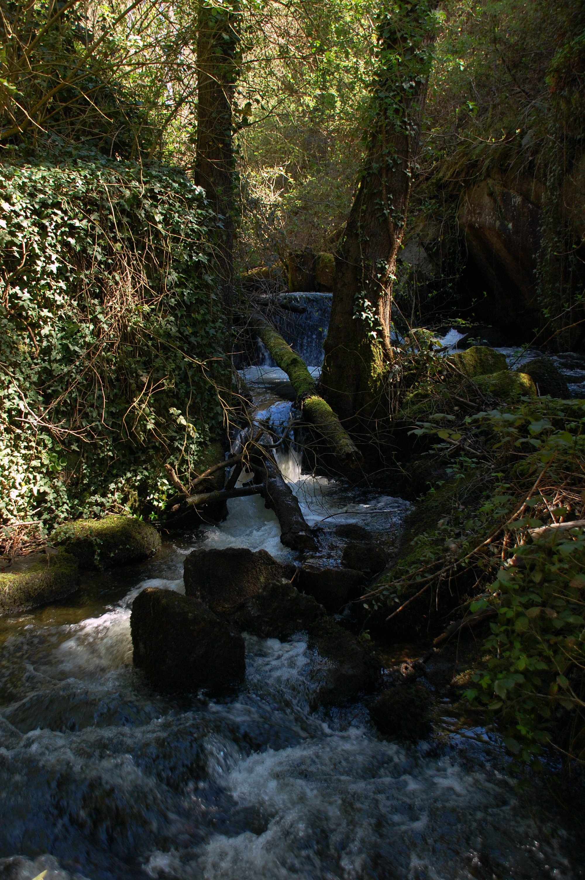 Río Fervedoira, afluente do río Rato, que a súa vez é afluente do Miño, preto do lugar de Fervedoira, no concello de Lugo.